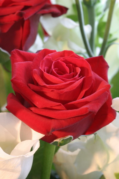 Rosa